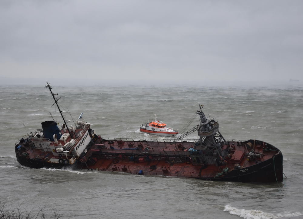 Танкер «Delfi» на мілині поблизу Одеси.